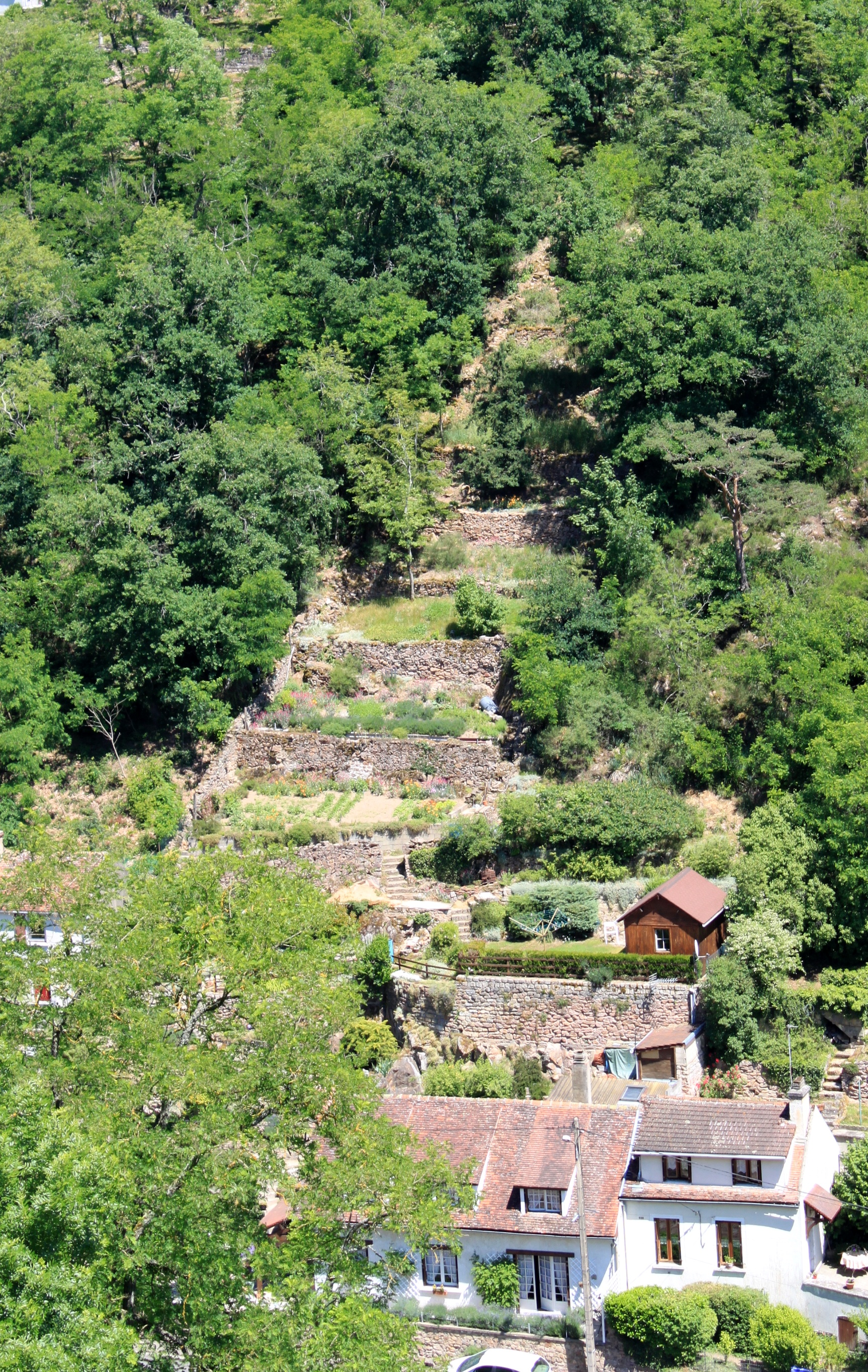 Les jardins-terrasses vus depuis le parc des Chaumes à Avallon (Yonne, Bourgogne, France).